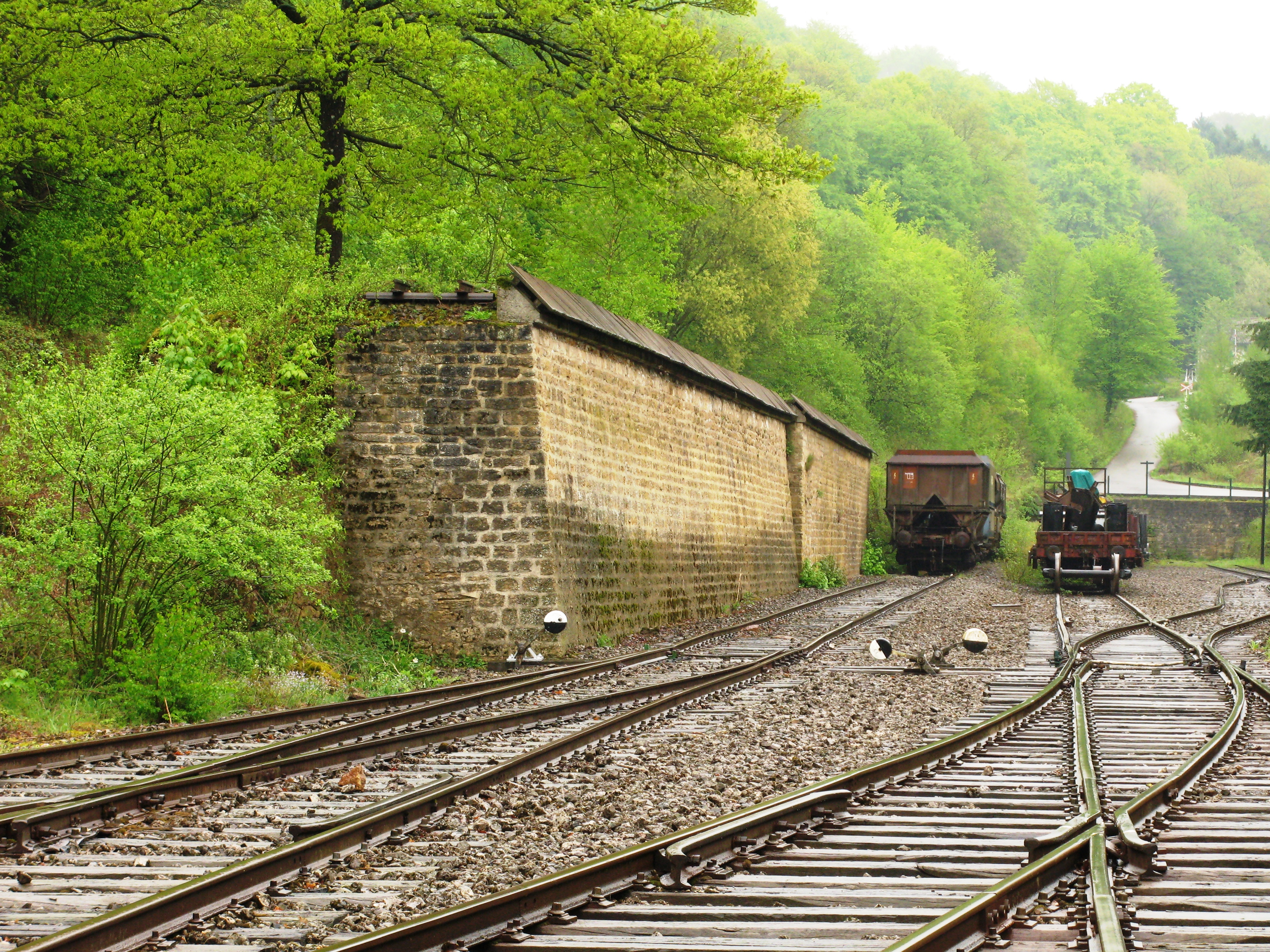 Quai de chargement pour minerai dans l'ancienne gare de Fond-de-Gras